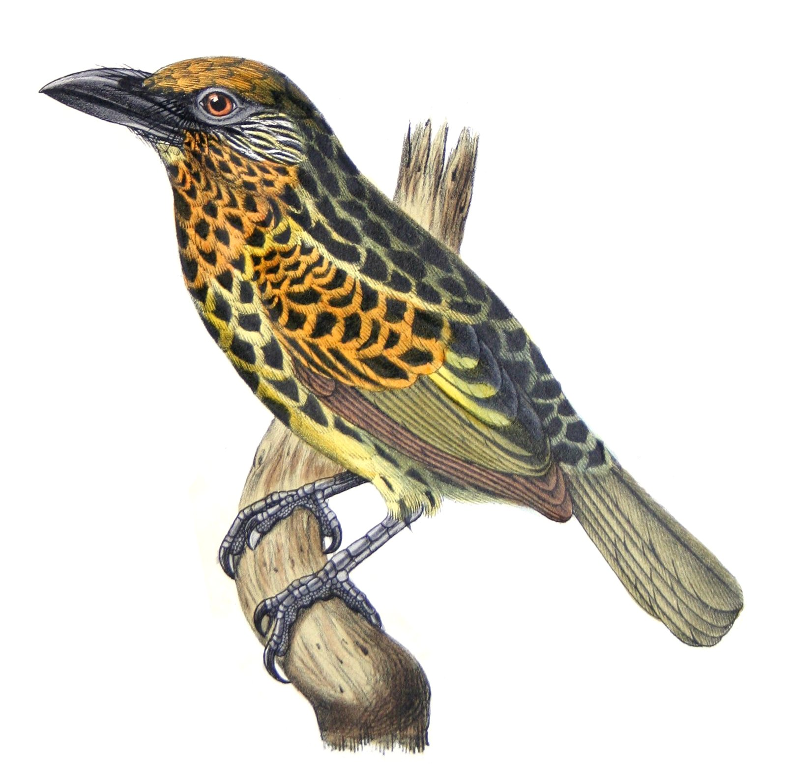 Micropogon aurifrons? = Capito auratus female (bottom)